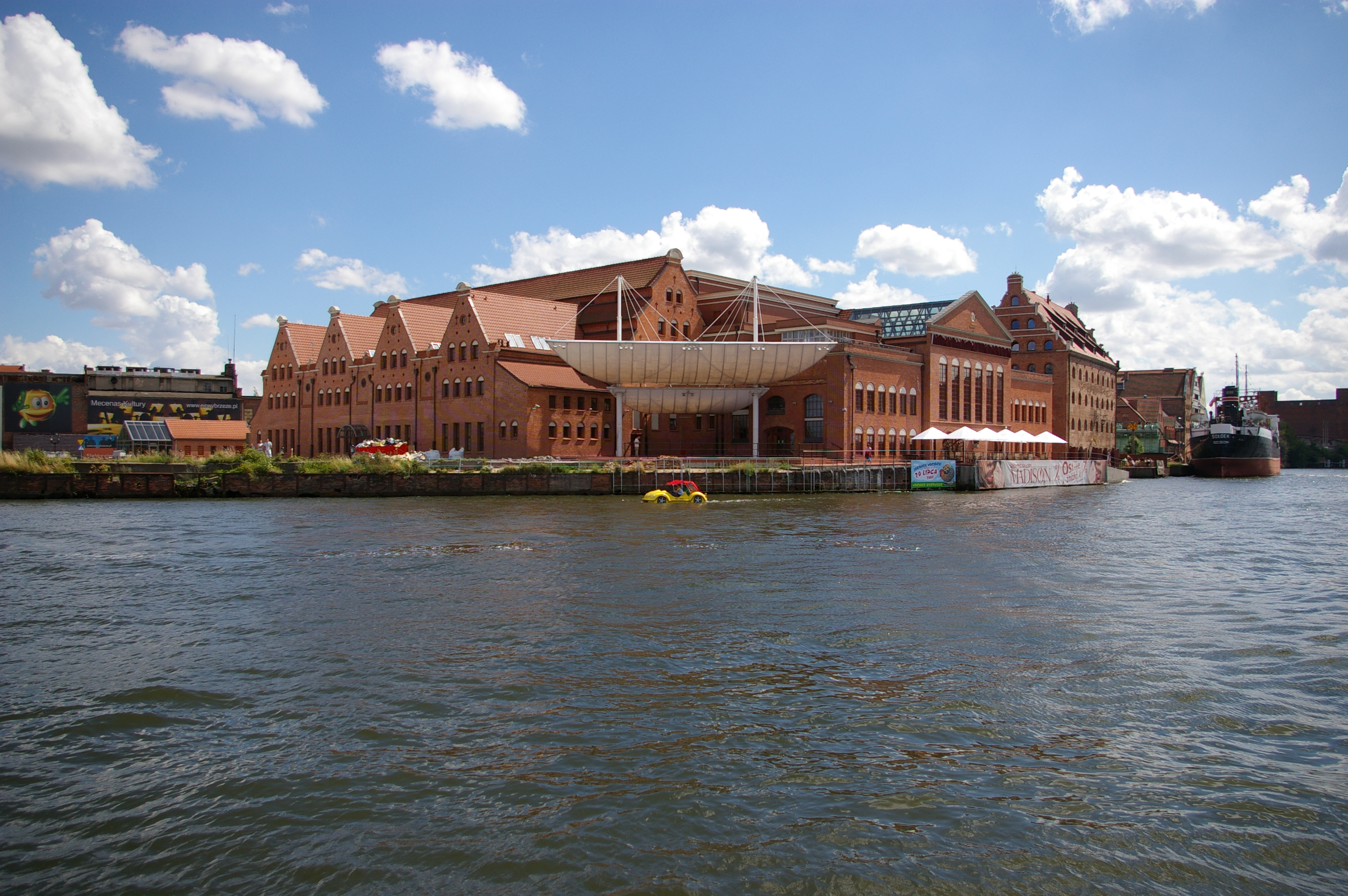 Filharmonia Bałtycka jako tło dla ładnego roweru wodnego